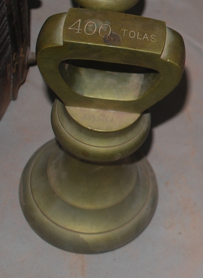 തോല,ഒരു പുരാതന അളവു തൂക്കക്കട്ടി,1 തോല = 11.66 ഗ്രാം